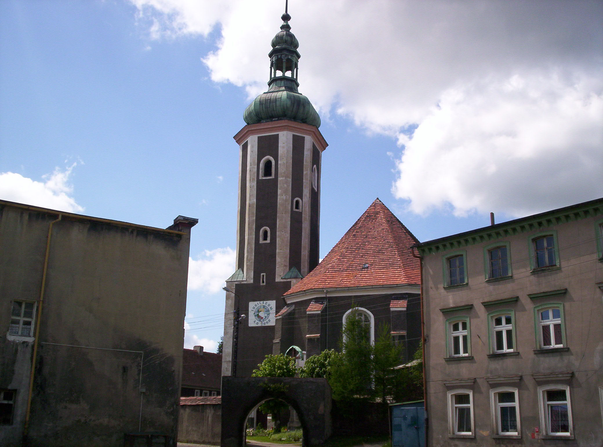 Die kath. Pfarrkirche Mariä Verkündigung.